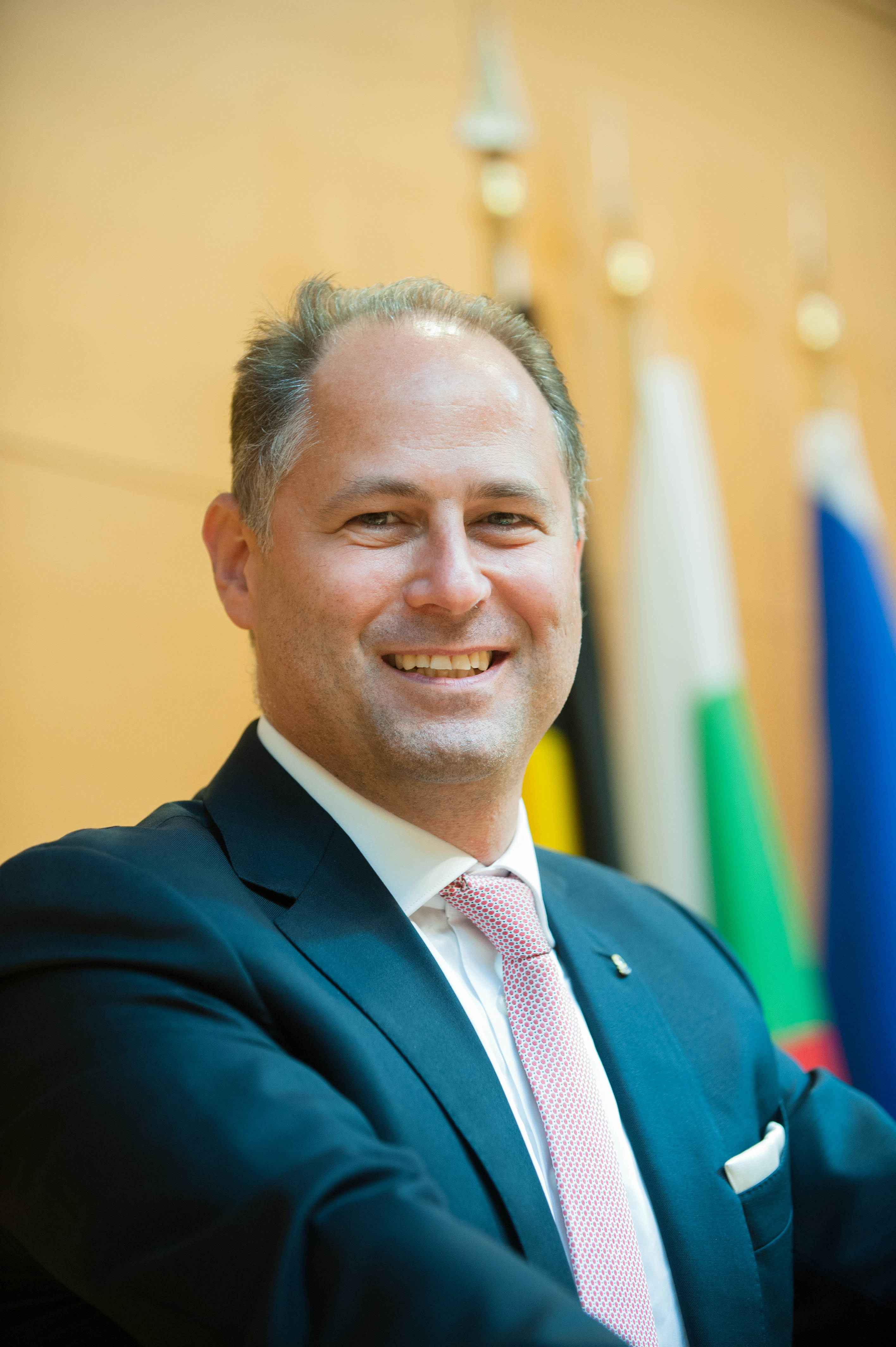 Prof. Dr. Daniel Bogdan Grubeanu, Zahnarzt und Implantologe